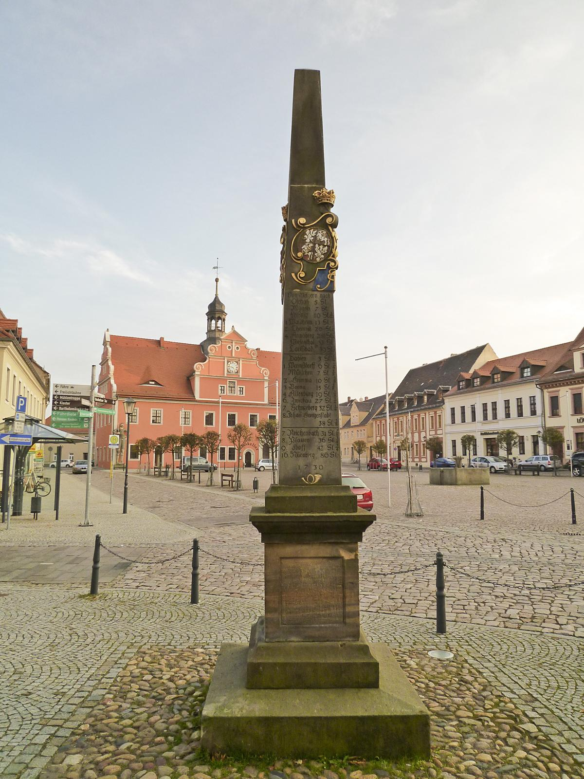 Kursächsische Postmeilensäule-Distanzsäule in Belgern